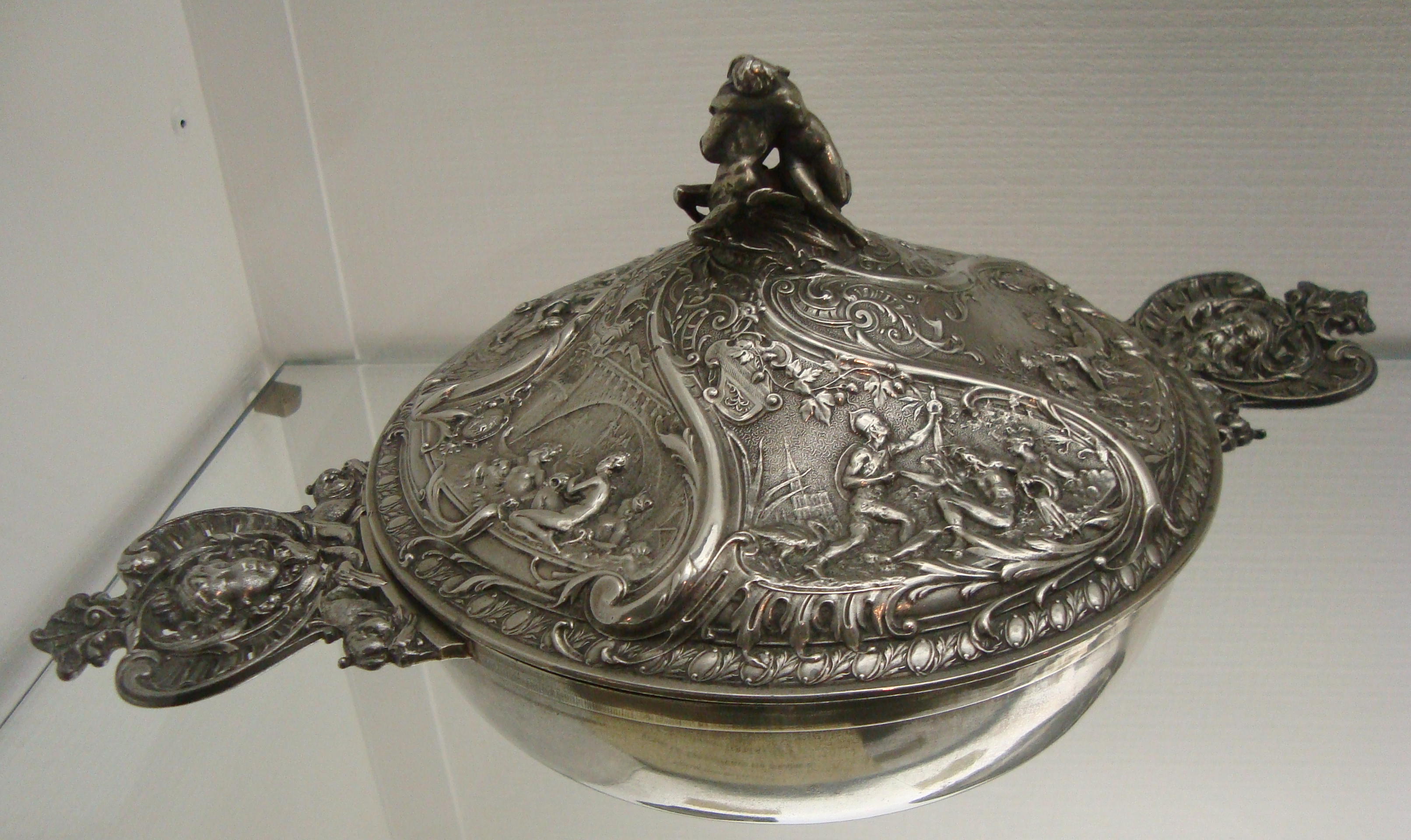 Ecuelle Christofle réalisée par Brateau en 1890